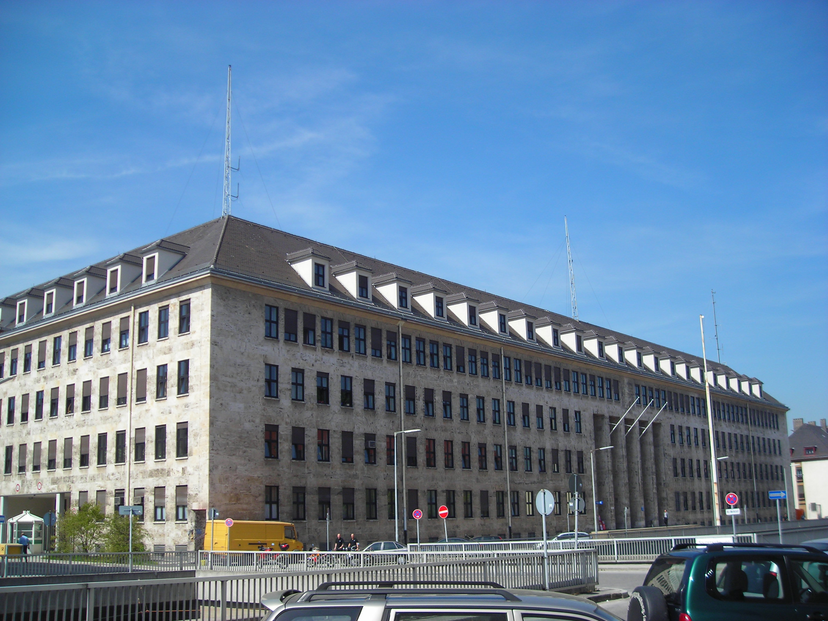 Dienstgebäude des Polizeipräsidiums München, Tegernseer Landstr. 210 in München-Giesing (ehemalige McGraw-Kaserne bzw. Reichszeugmeisterei)